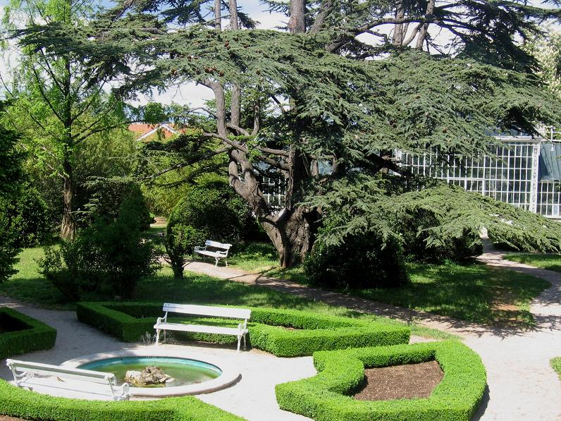 Sežana, Slovenia - botanical garden